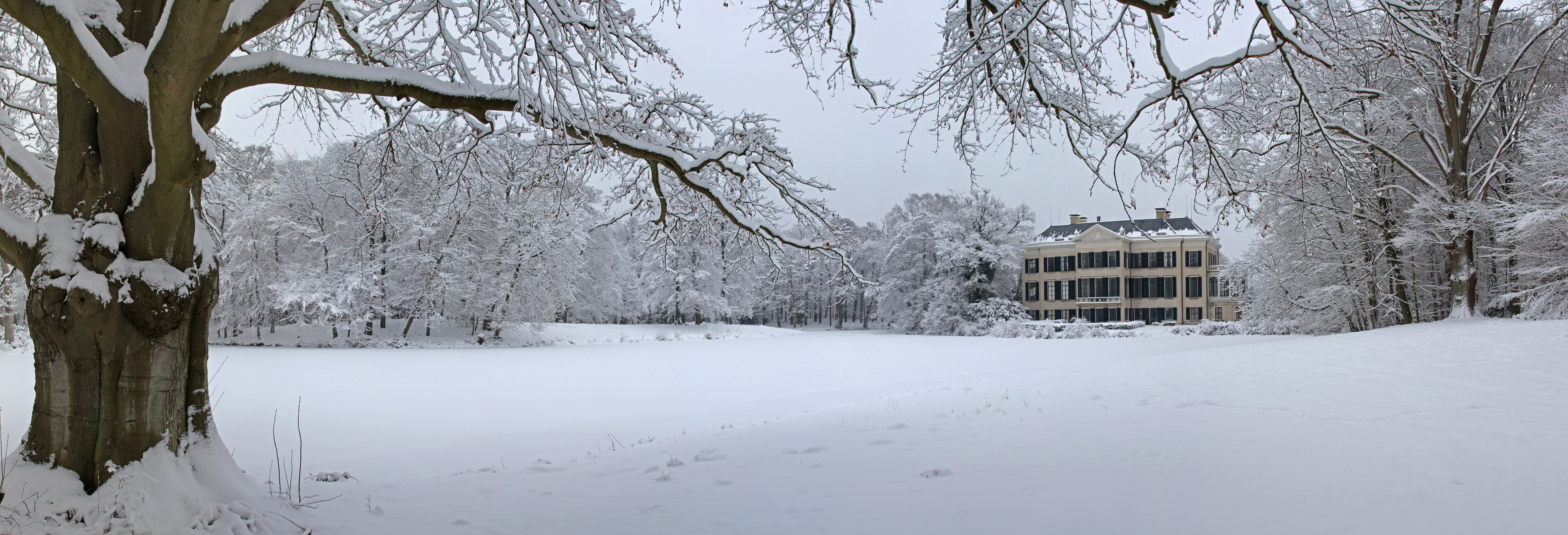 Kasteel Broekhuisen is een ridderhofstad, landhuis en landgoed te Leersum, gemeente Utrechtse Heuvelrug in de Nederlandse provincie Utrecht.